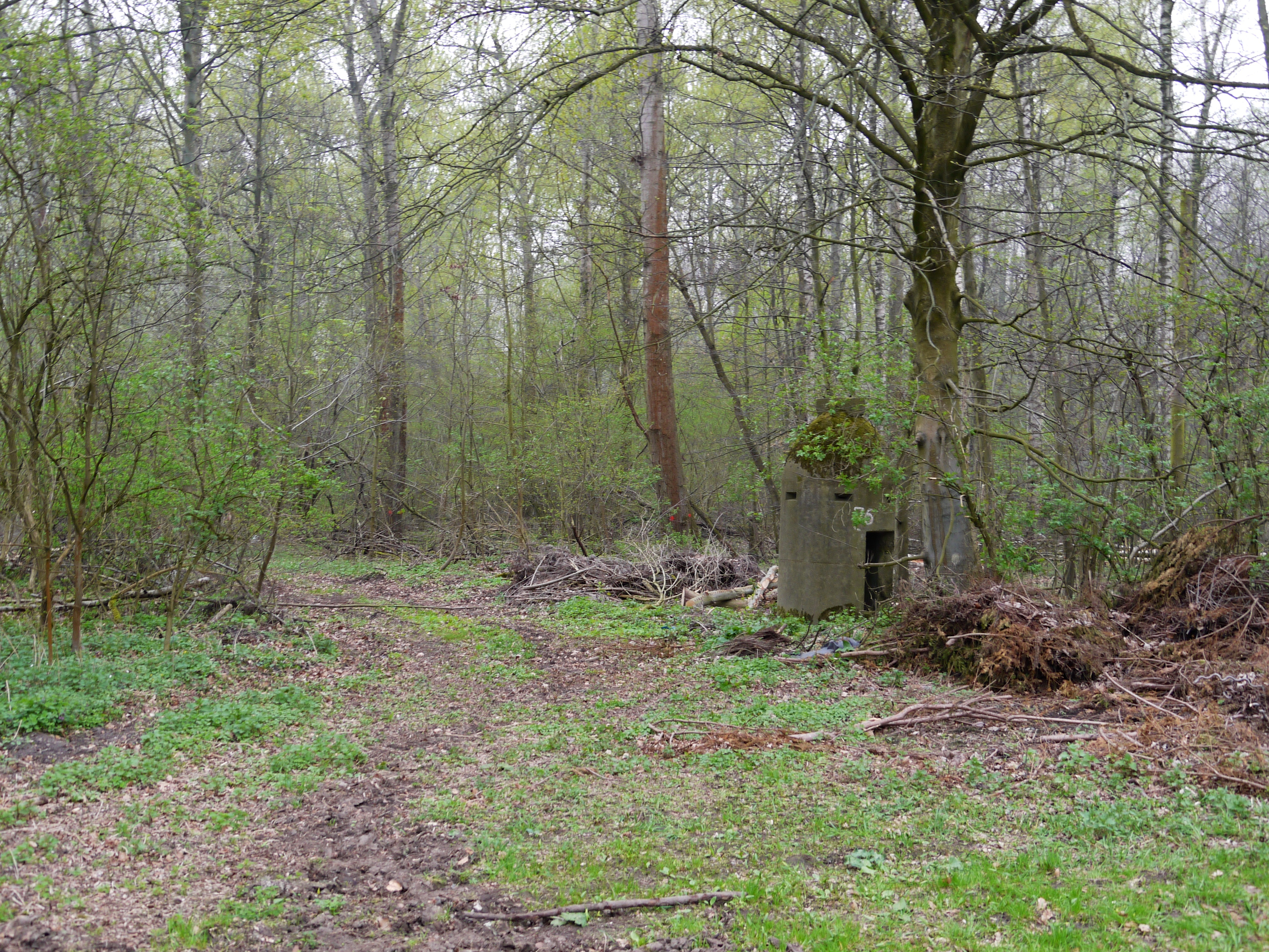 Salzgitter-Hallendorf: Eingang zum ehemaligen Arbeitserziehungslager (Lager 21)